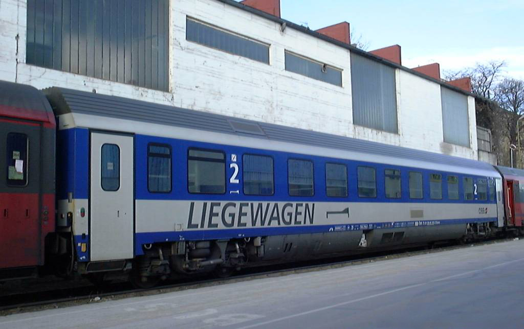 ÖBB-Liegewagen am 2002-01-30 in Wien Photo: tobias b köhler